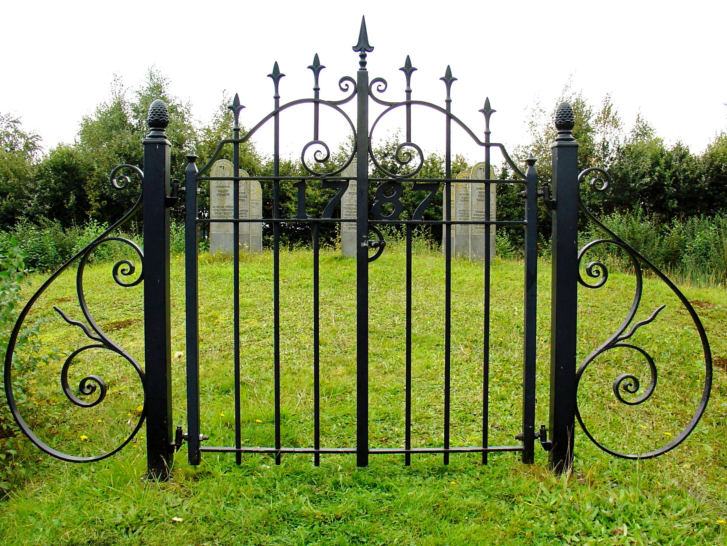 1787 door Jorgen Leijenaar Noorderdiep Stadskanaal - herinnering aan de ontginning van het gebied